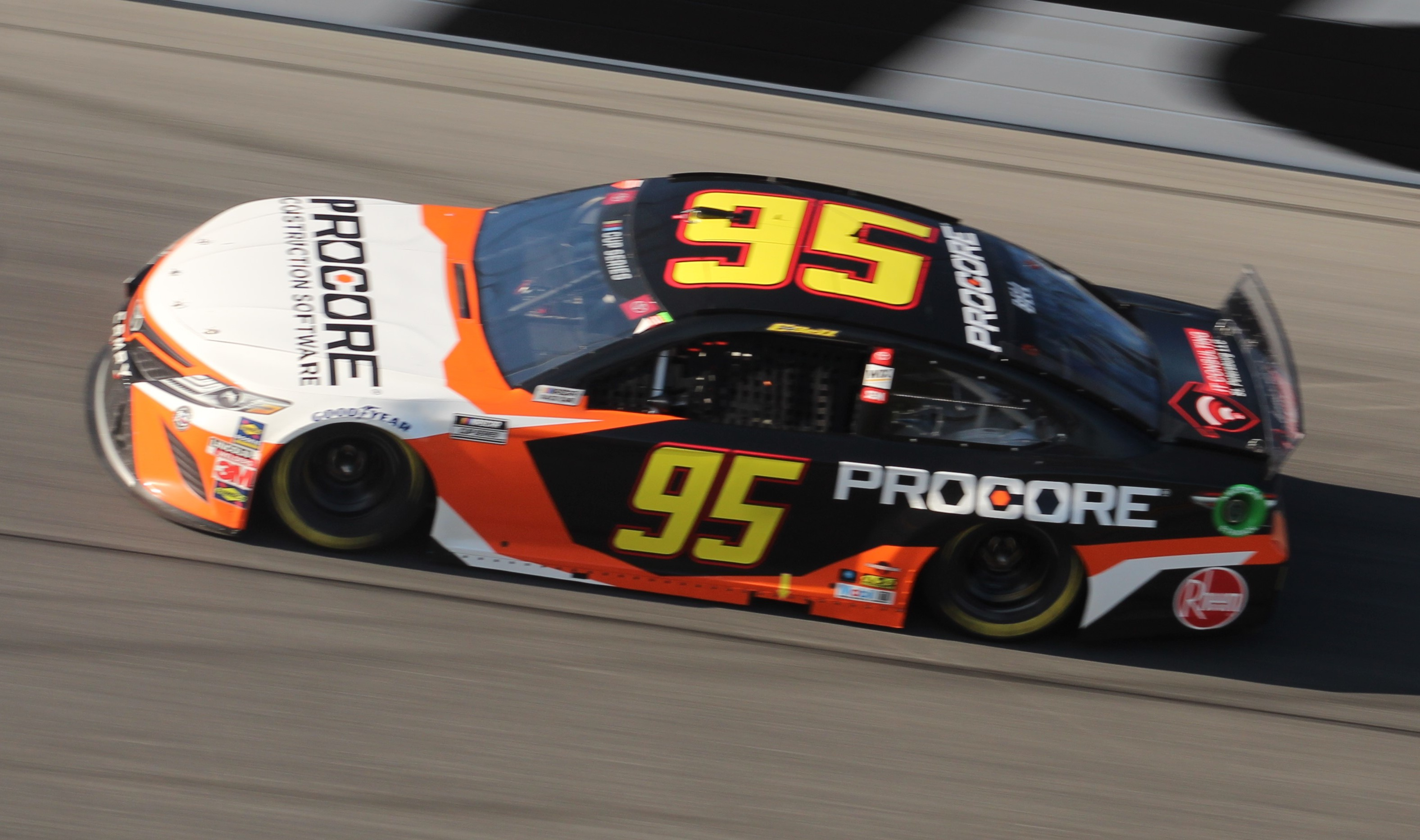 Daytona Speekweeks, 2020